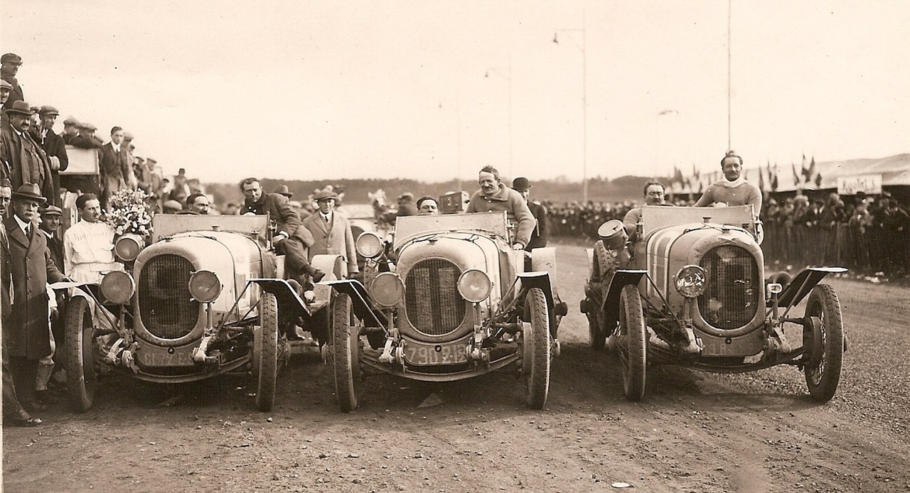 Fernand Bachmann au 24h du Mans 1923